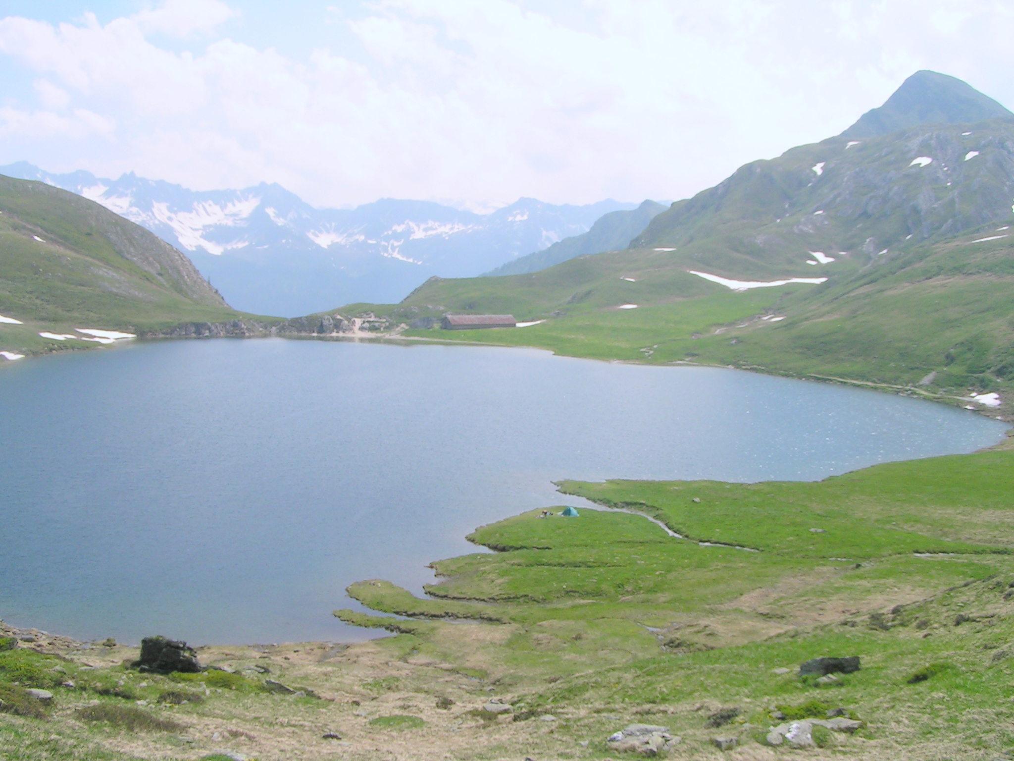 Lago di Tom, Canton Ticino, Svizzera